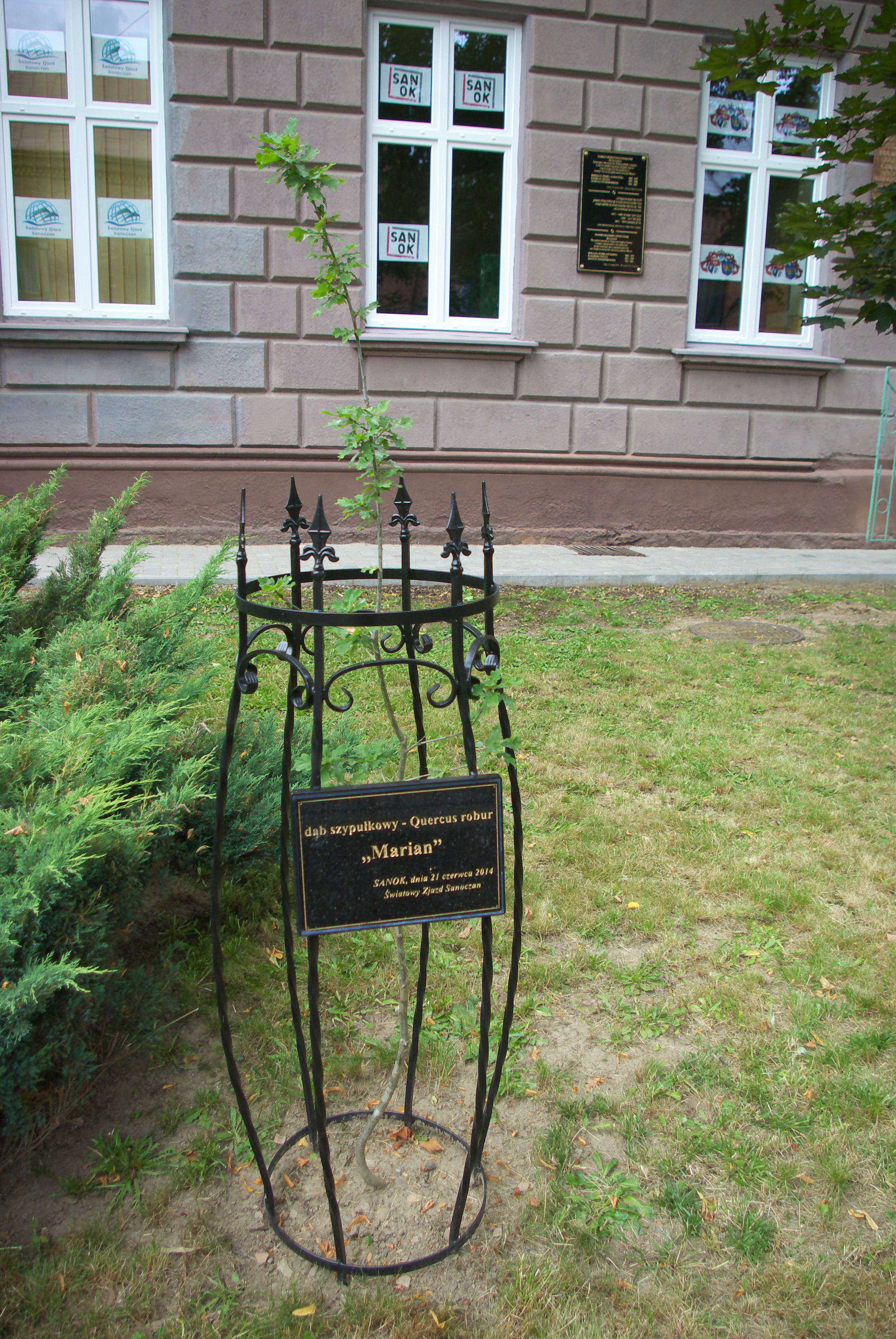 Dąb szypułkowy "Marian" honorujący absolwenta gimnazjum, którym był literat Marian Pankowski. Zasadzony przy Gimnazjum nr 2 im. Królowej Zofii w Sanoku 21 czerwca 2014